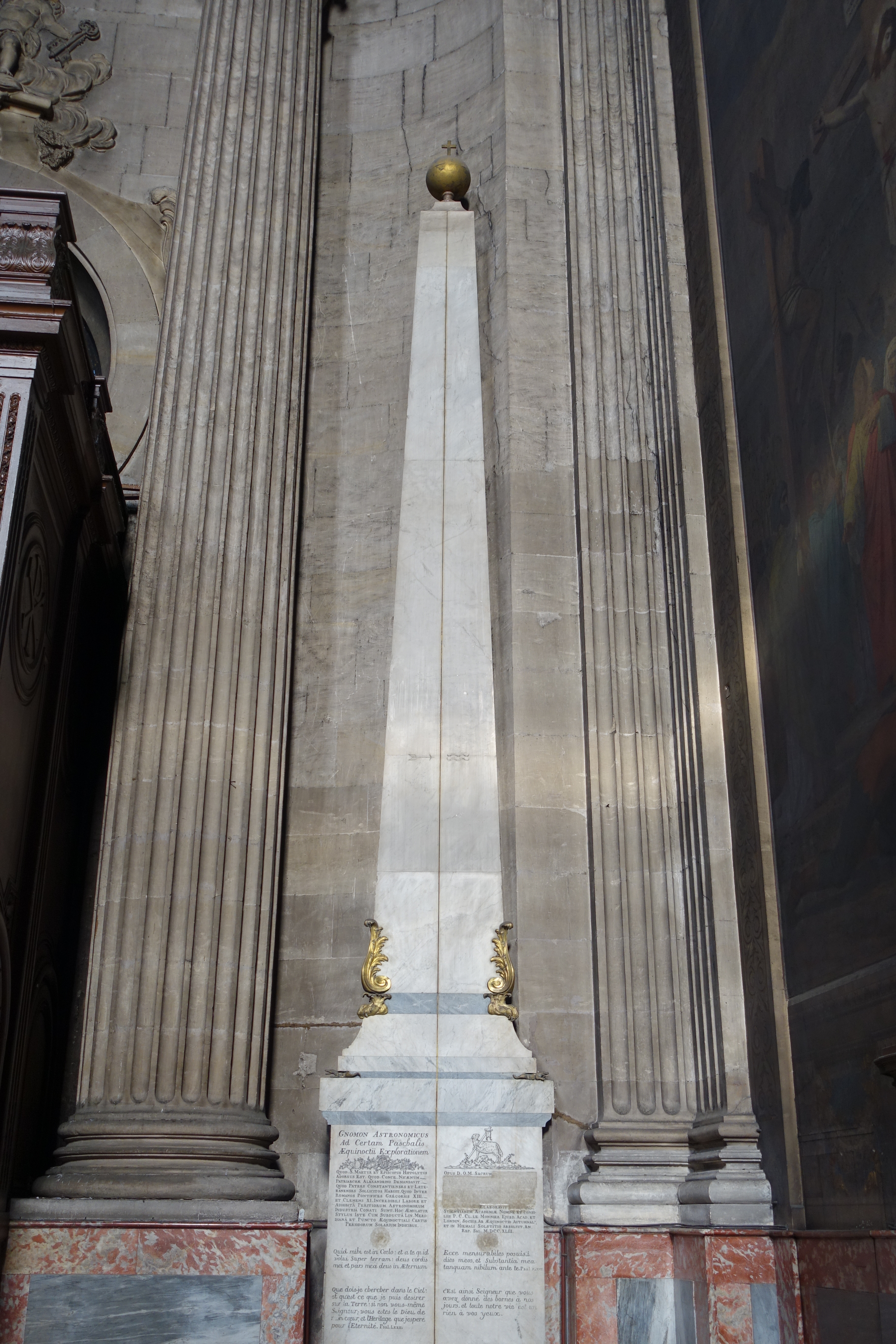 Église Saint-Sulpice @ Saint-Germain-des-Près @ Paris